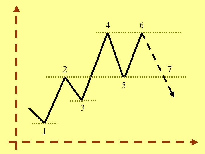 Description: esquema de posible cambio de tendencia (double top) Source: Trabajo propio Author: LCB Date: Julio 21, 2006 Authorization: Dominio Público